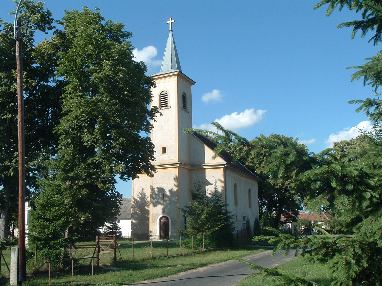 The Roman Catholic Church in Szenttamás (Püspökmolnári), Hungary. Szent Tamás apostol római katolikus templom